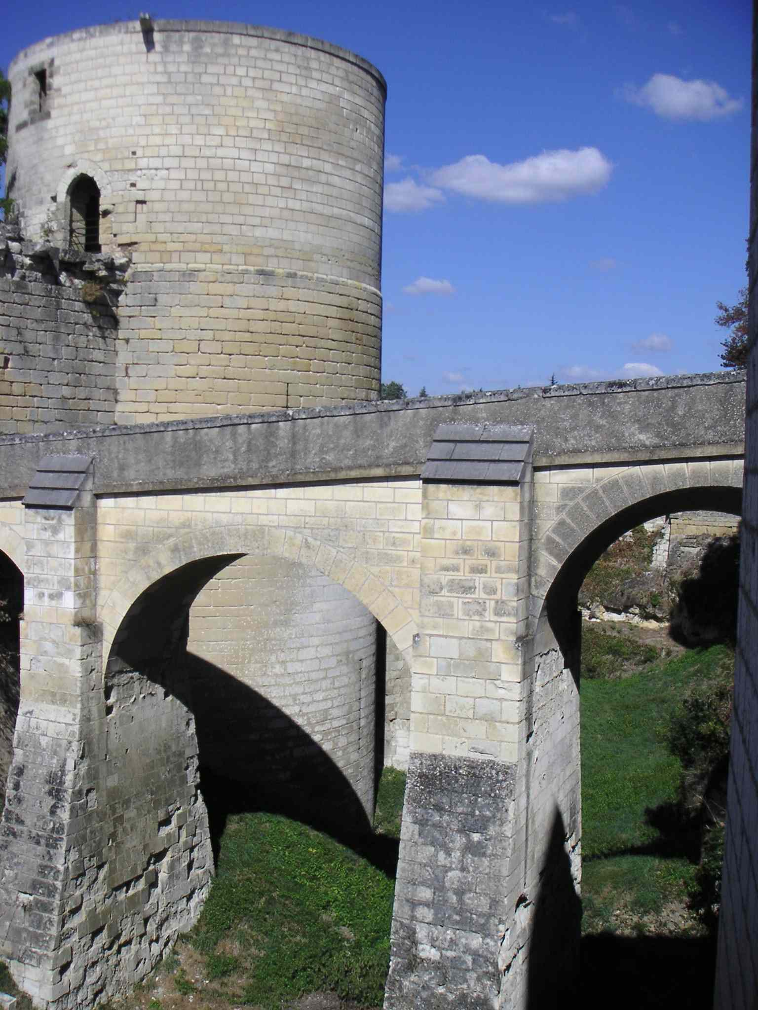 Douves séches séparant le château du milieu et le Fort du Coudray. Donjon du château de Chinon (France)